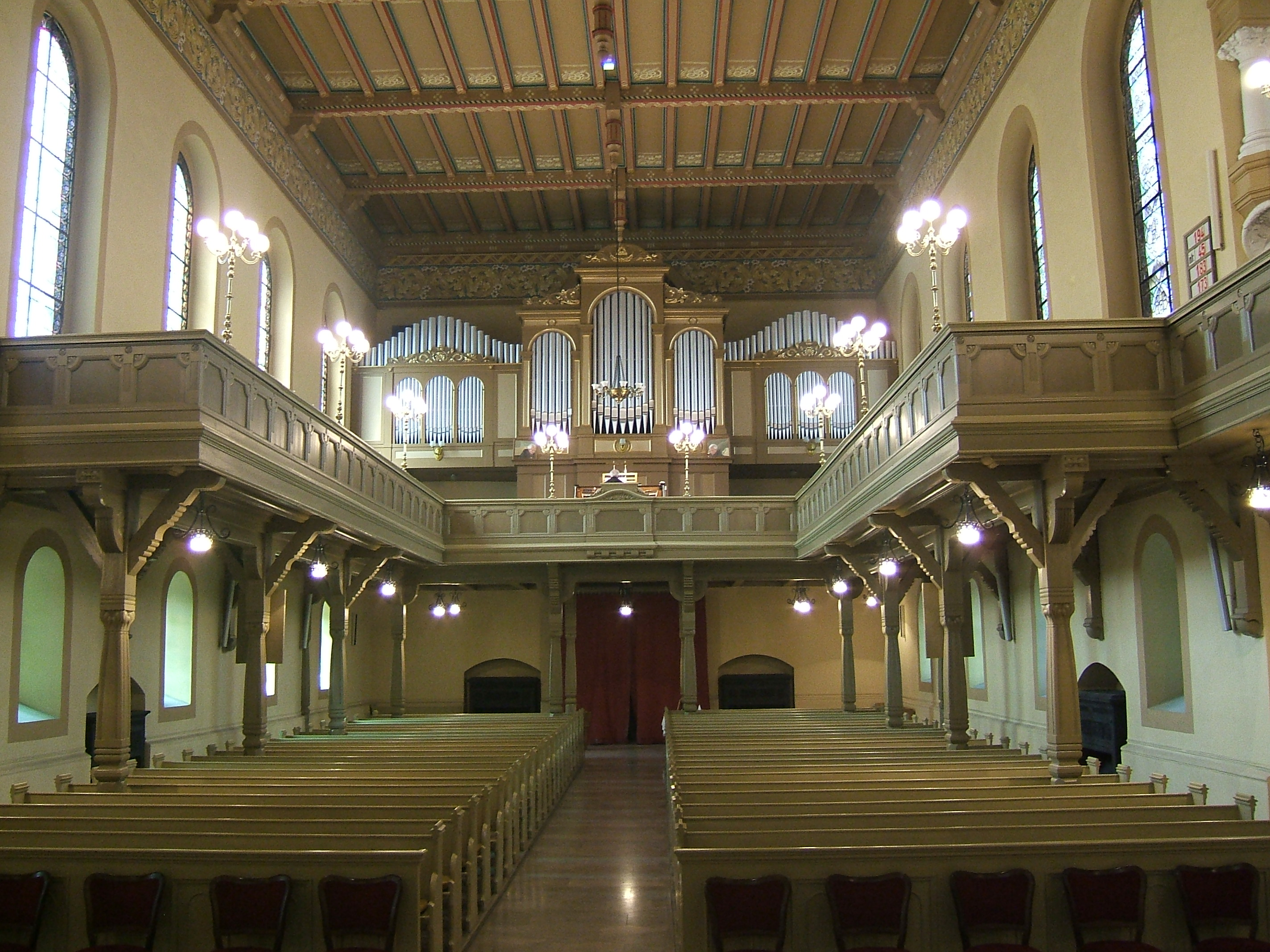 Blick auf die Empore der evangelischen Kirche zu Kattowitz.